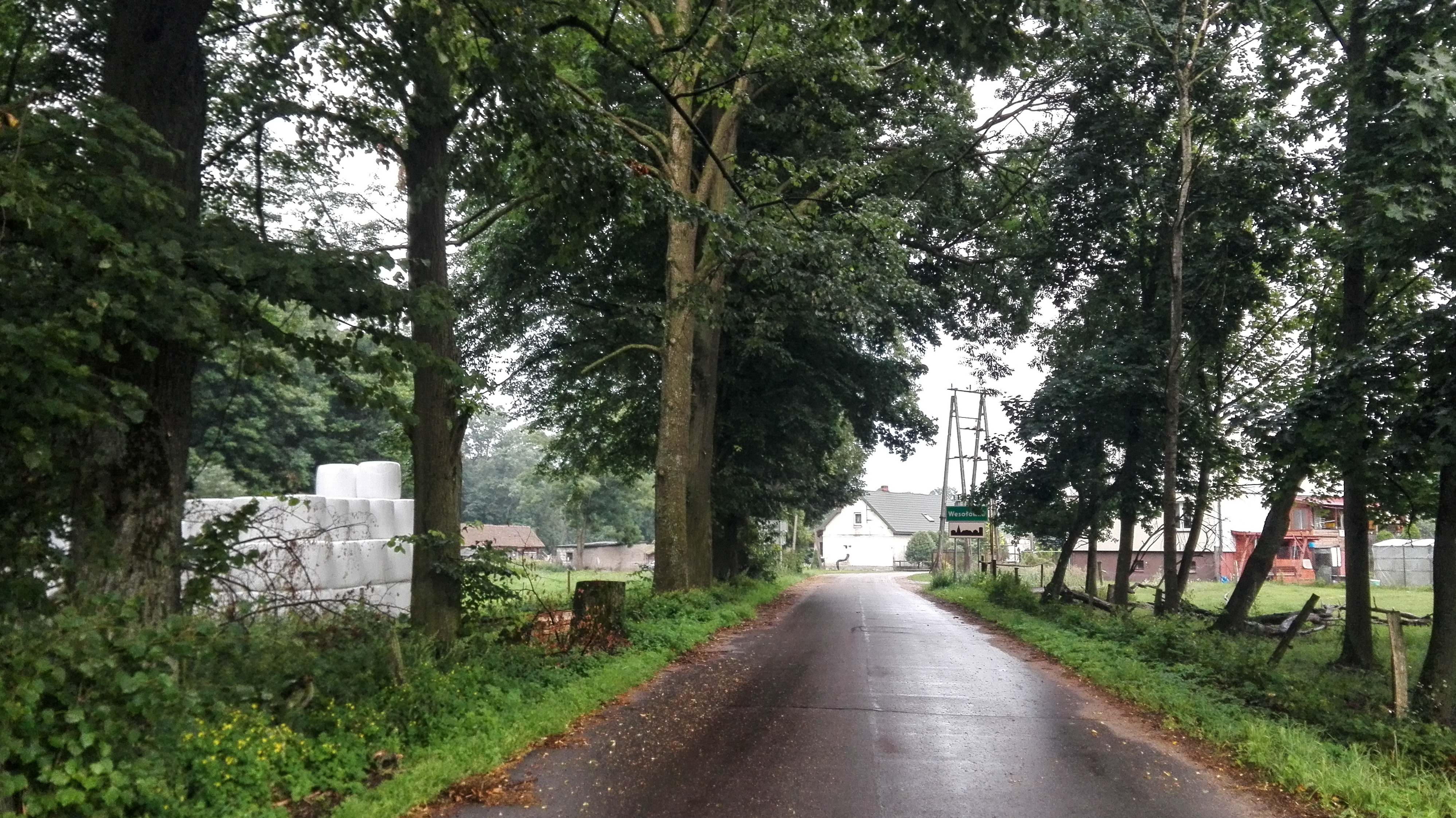 Obszar specjalnej ochrony ptaków: Puszcza Napiwodzko-Ramucka: wjazd do Wesołówka od strony Wesołowa This is a photography of protected area with CRFOP ID PL.ZIPOP.1393.N2K.PLB280007.B